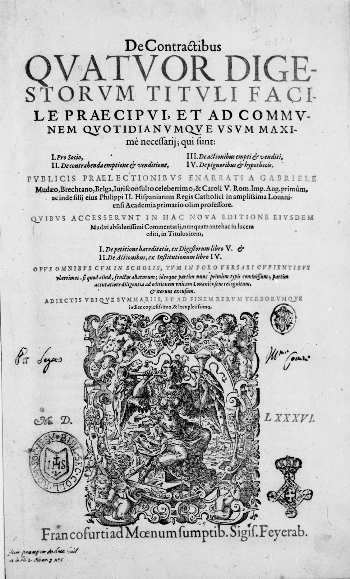 Frontespizio